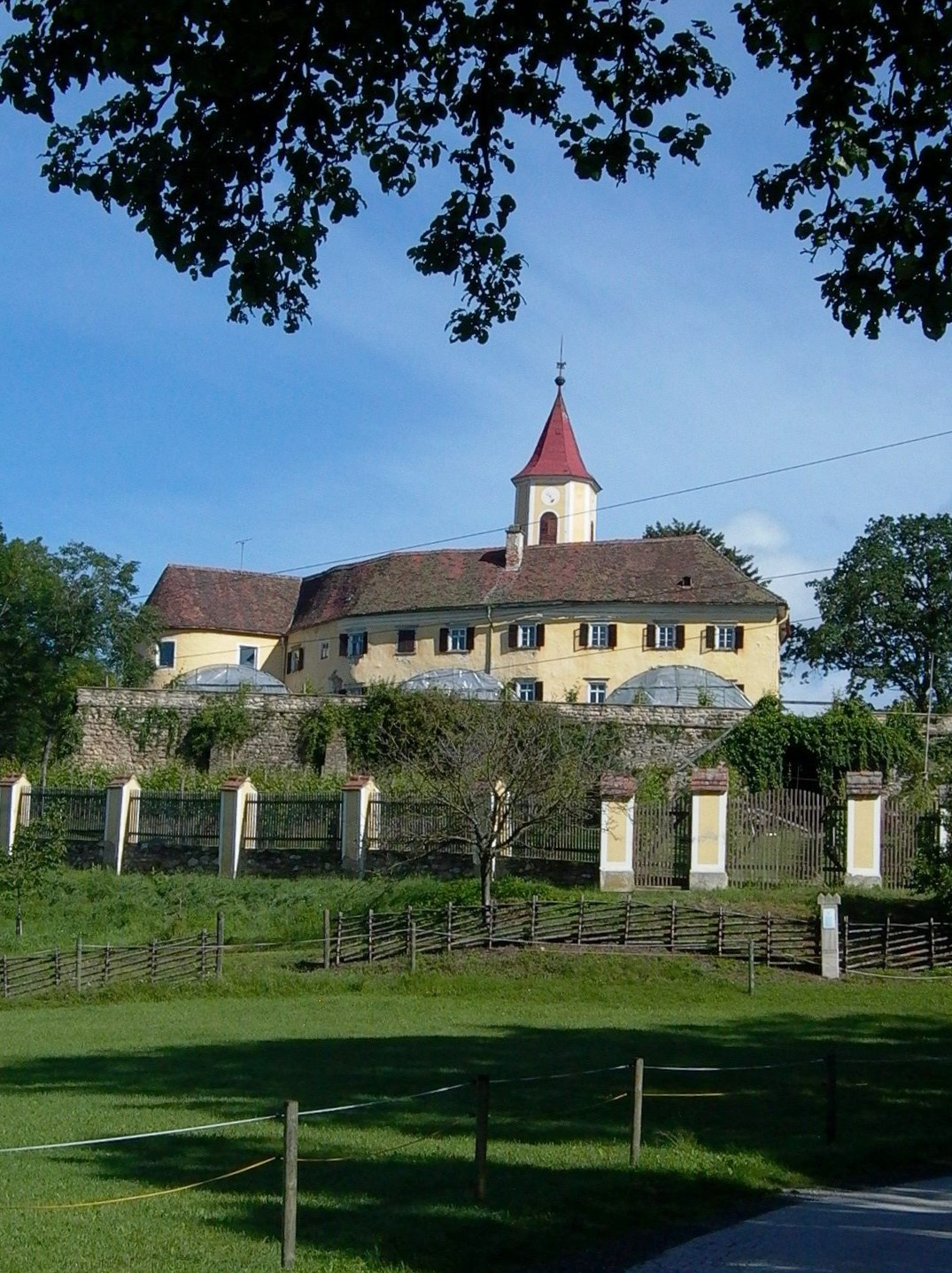 Kirchberg am Walde - Castle